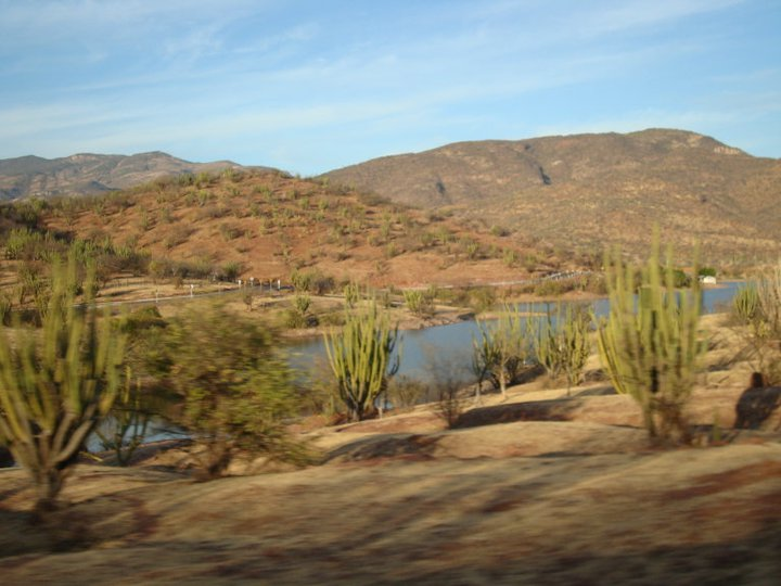 Rio Balsas